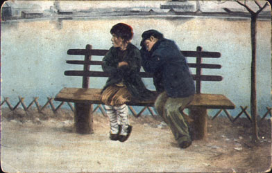 "Безприютные". Шестеркин М.И. Скан с почтовой карточки 1906 г